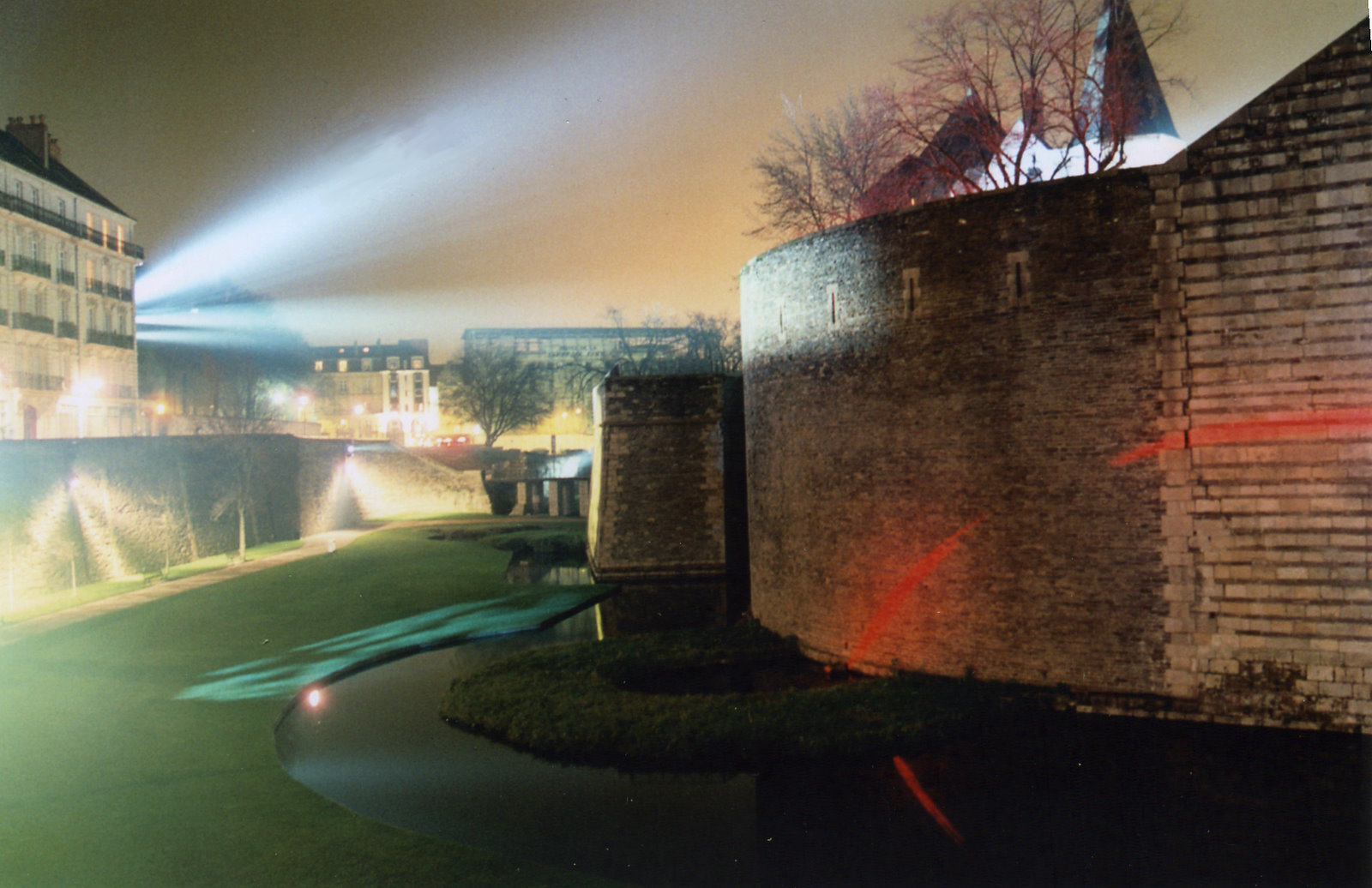 Chateau des Ducs de Bretagne - FRANCE - Nantes (44)